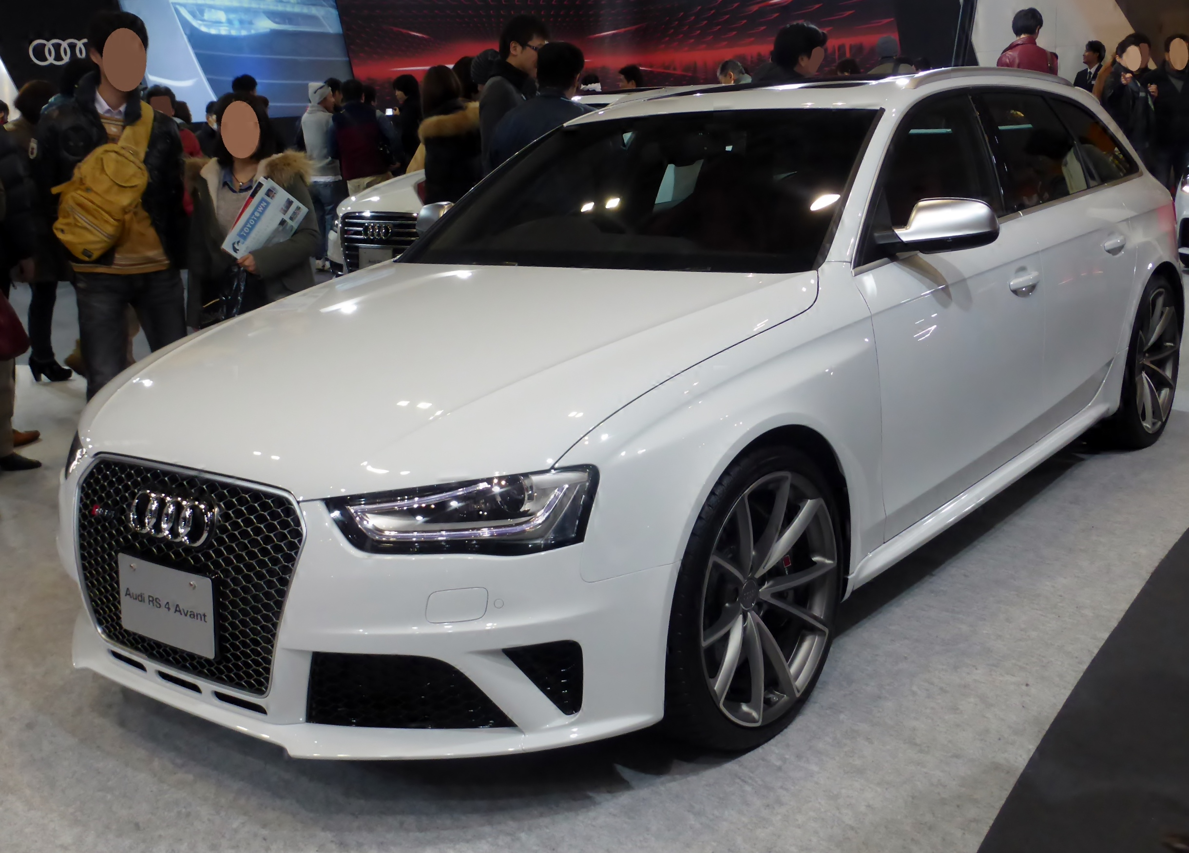 大阪モーターショー2013のアウディブースにおいてB8型RS4アヴァントを撮影。